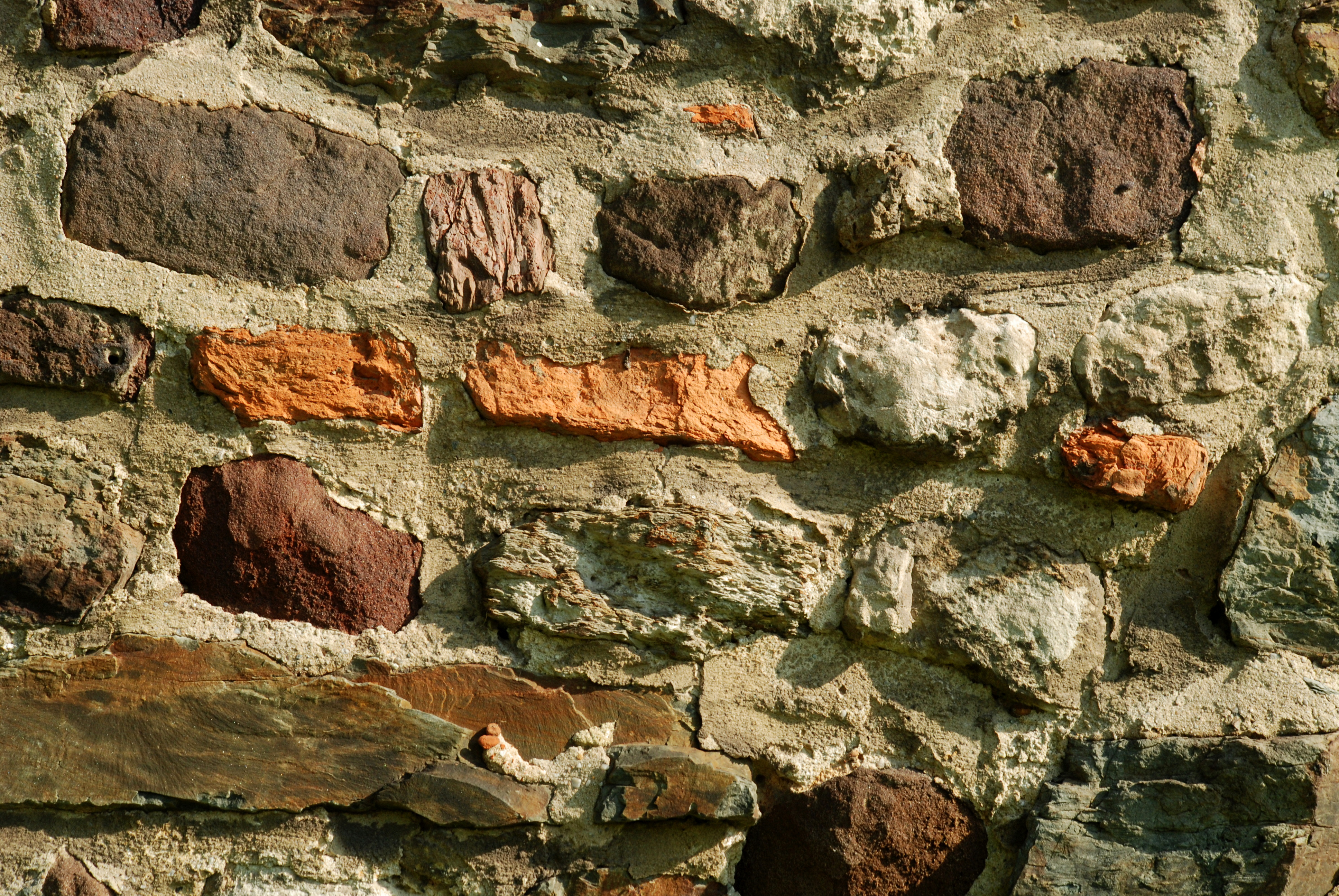 Belgique - Brabant wallon - Ottignies - Église Notre-Dame de Mousty